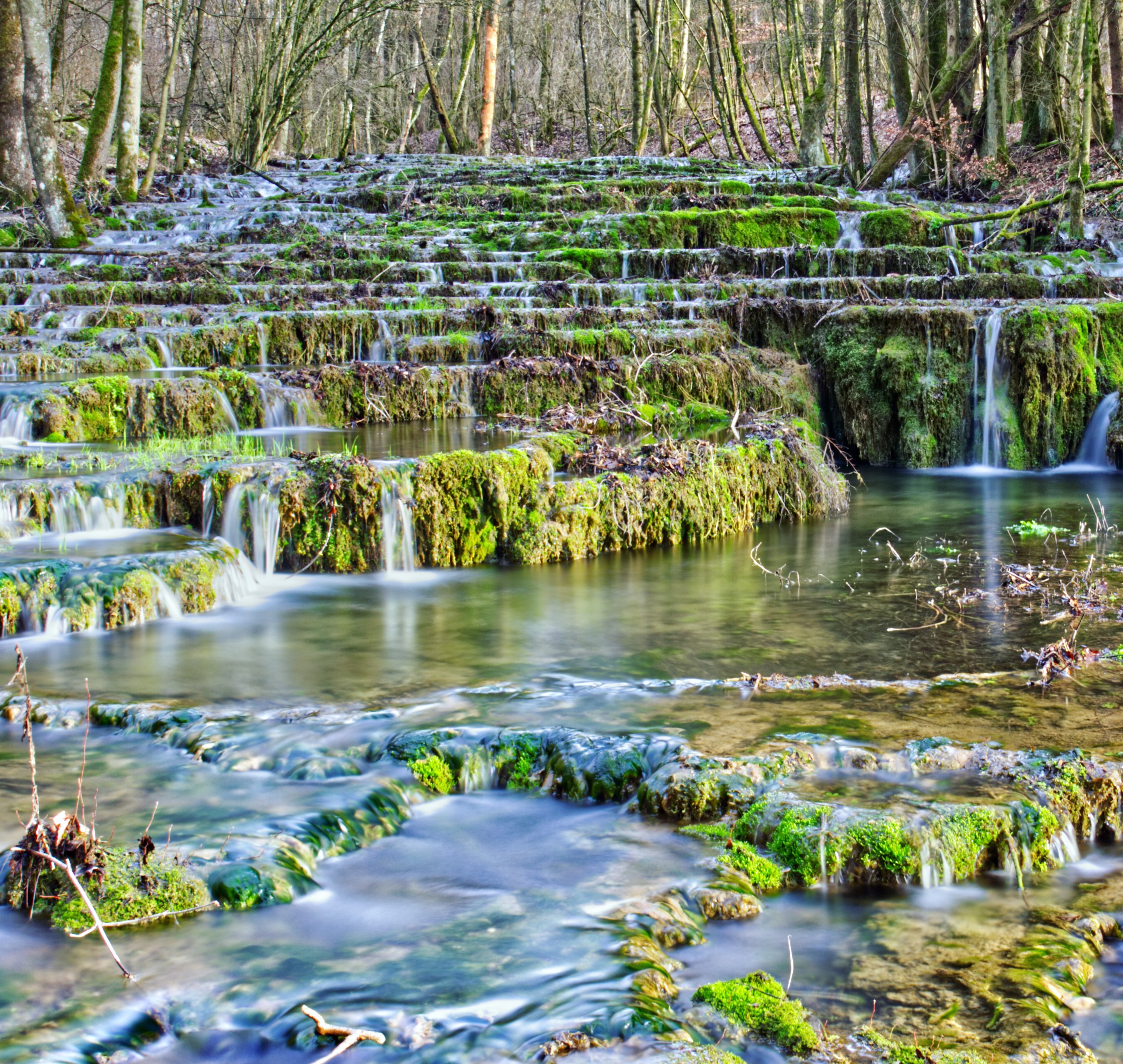 Eine unter Naturschutz stehende Abstufung der Lillach. Einen Flusslauf in der Nähe des oberfränkischen Dorfes Weißenohe.